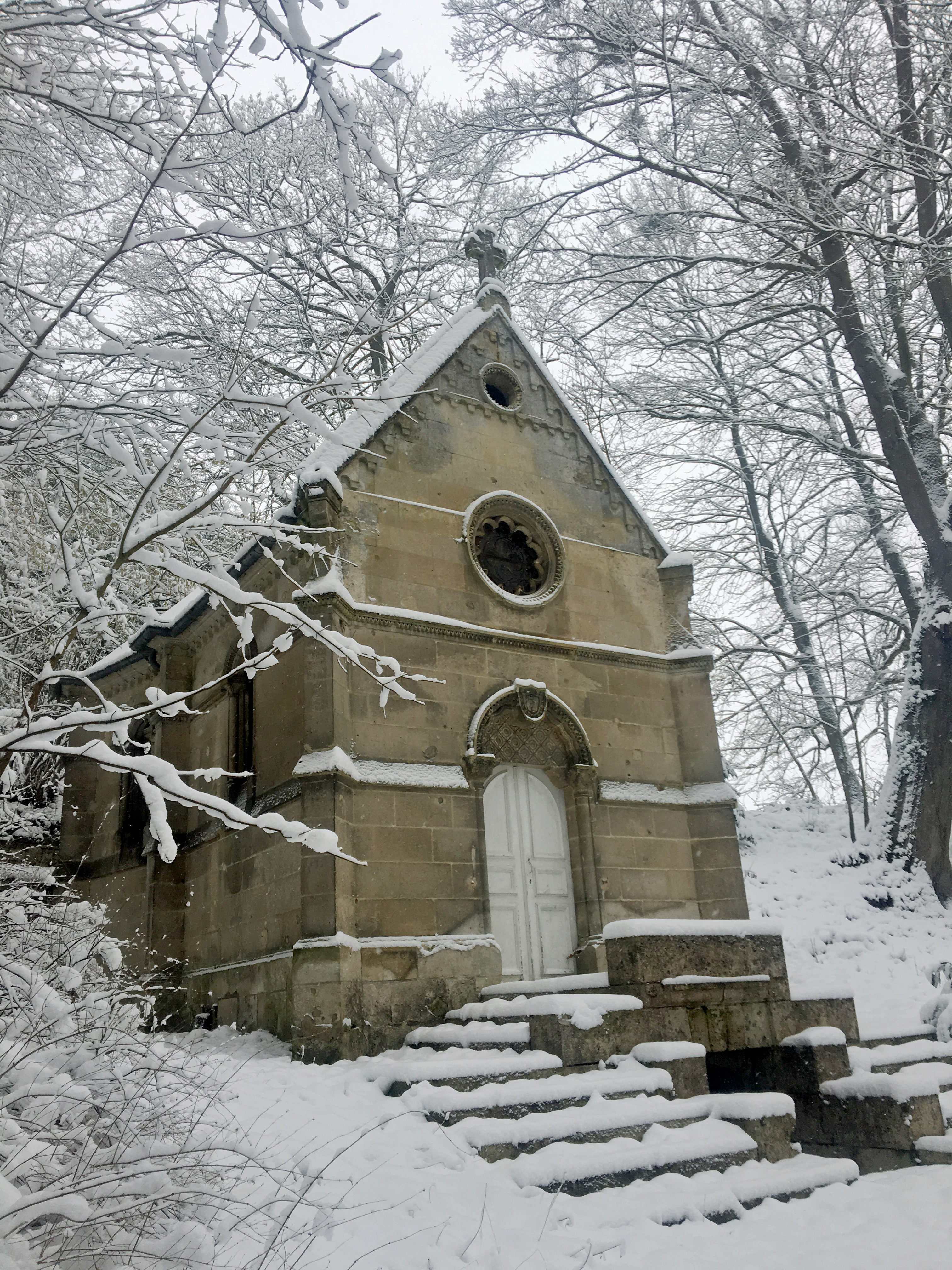 Chapelle du Château de Montois